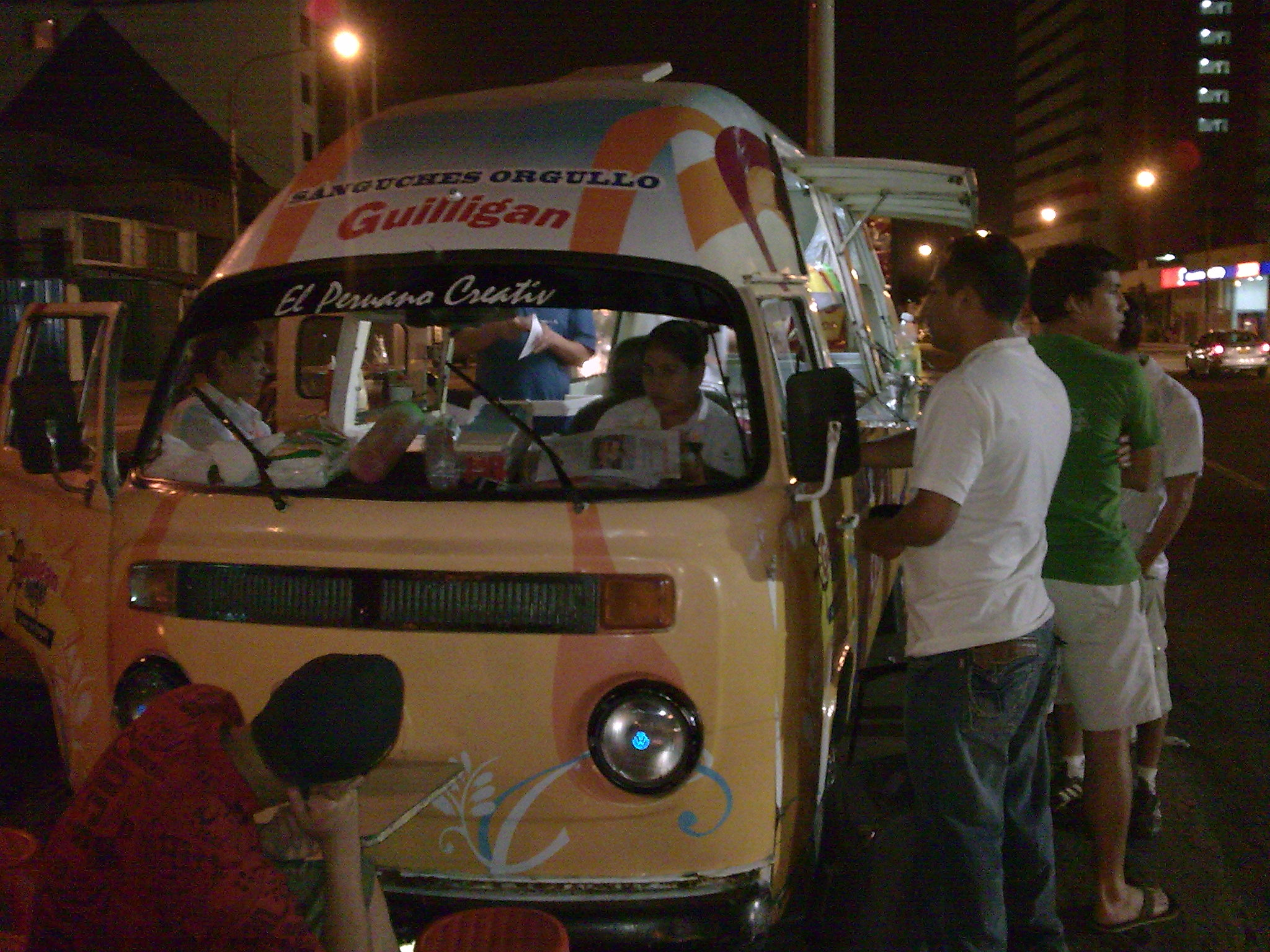 Un carro adaptado para la venta de hamburguesas y salchipapas regentado por la empresa Guilligans. Distrito de La Victoria. Lima - Perú.